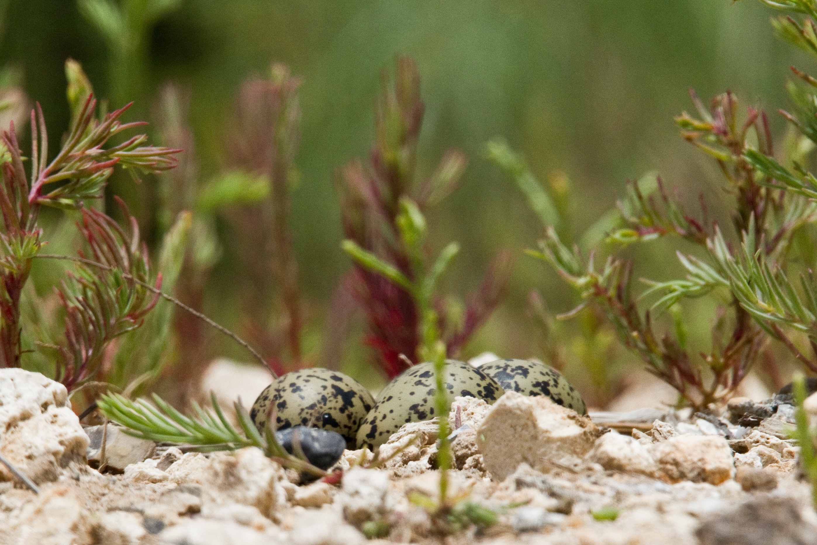 Black-necked Stilt eggs, Quintana, Texas